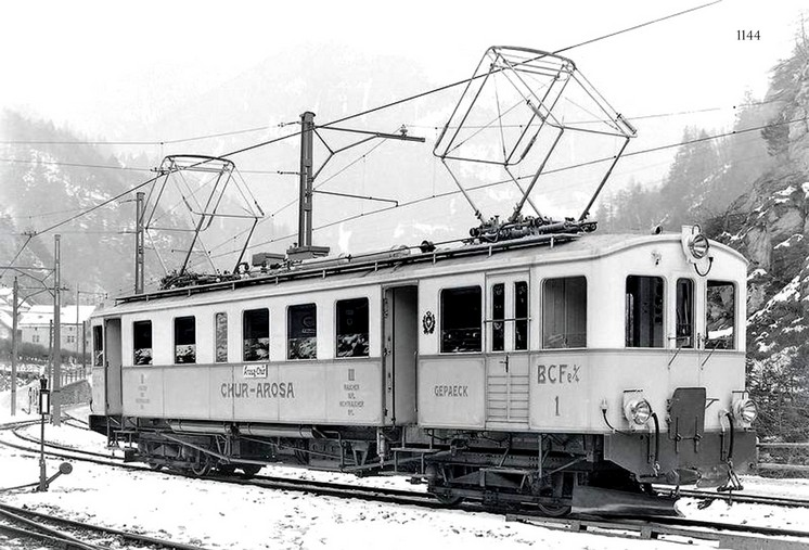 Triebwagen BCFe 4/4 1 der Chur-Arosa Bahn anlässlich der Inbetriebnahme im Jahr 1914